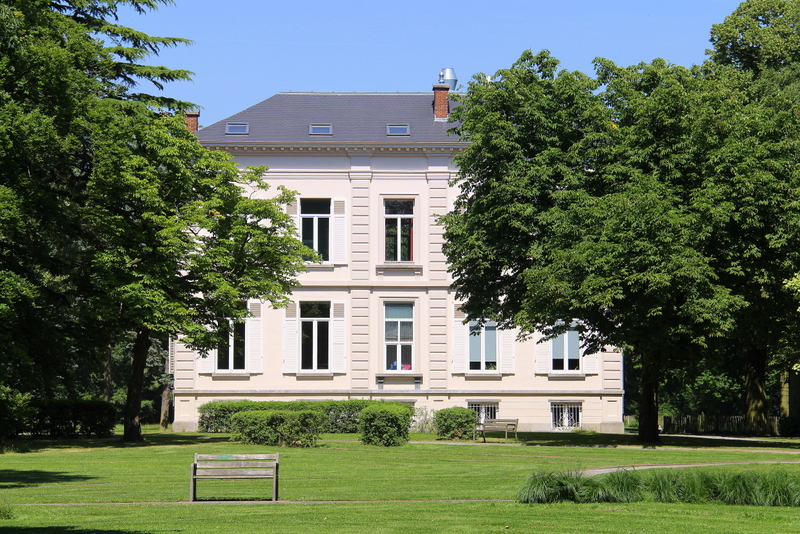 In 1873 liet Jonker E. Guyot dit neoklassiek kasteel bouwen. Guyot was Ekers burgemeester van 1884 tot 1894. Toen werd het kasteel "Hof van Guyot" genoemd. Later werd dit Hof De Bist" naar de plaatsnaam De Bist. Het domein met kasteel werd in 1968 aangekocht door de gemeente en werd het omgevormd tot openbaar park. Vanaf 1972 is het kasteel in gebruik als "Kunstcentrum de Bist" waar kunstenaars hun werk voorstellen.